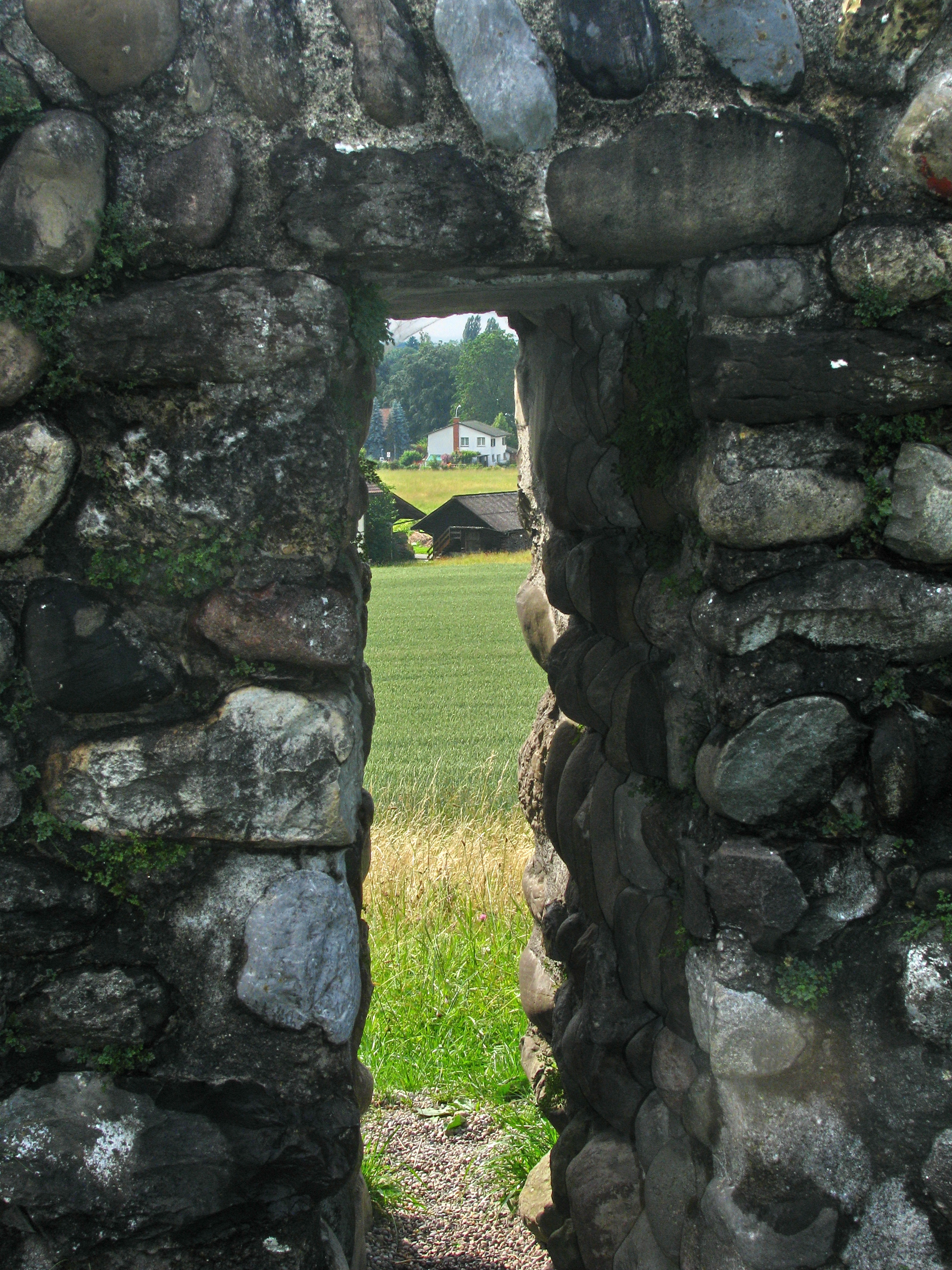 Römisches Kastell in Irgenhausen (Pfäffikon), Pfäffikon im Hintergrund